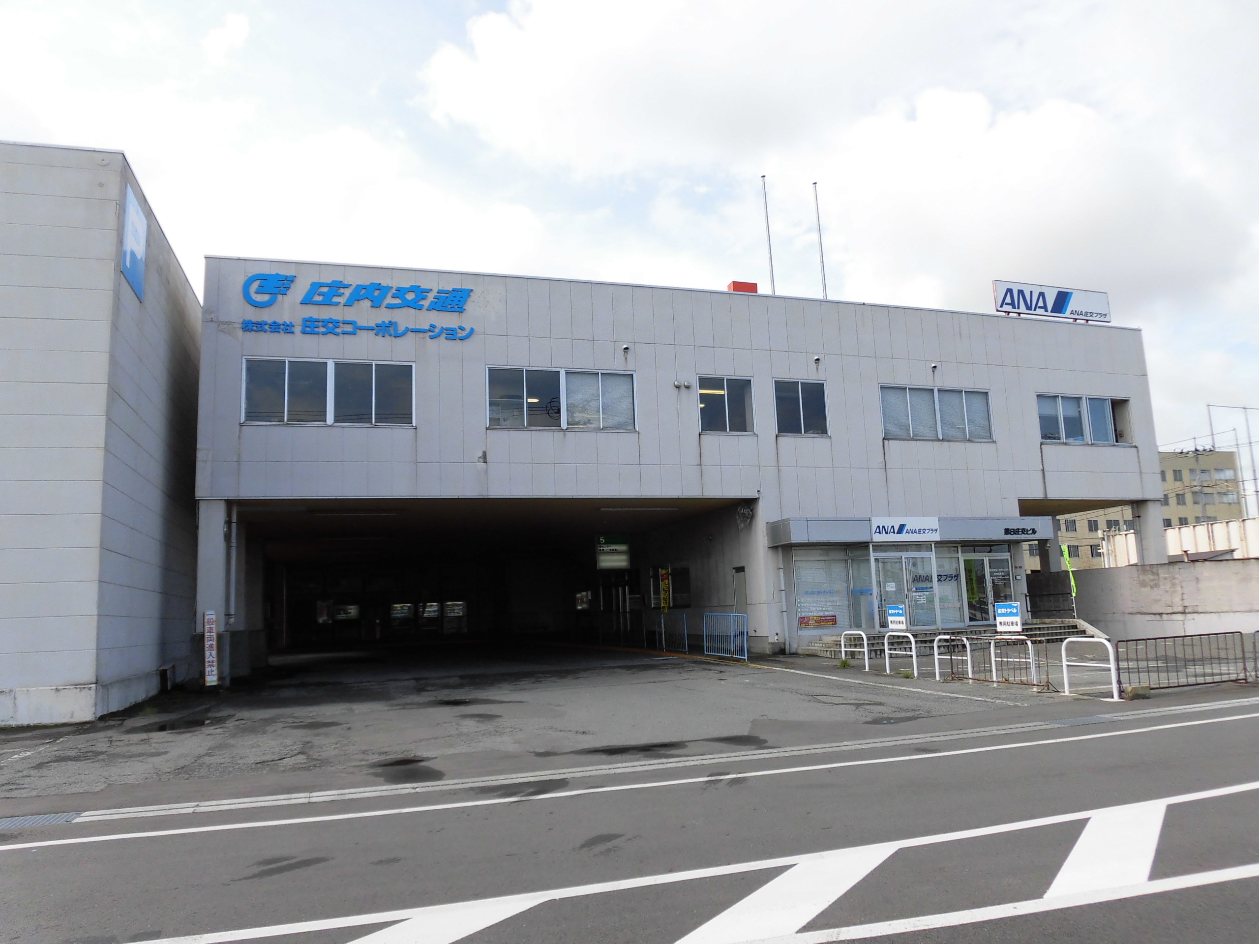 庄内交通本社。山形県鶴岡市錦町に所在。